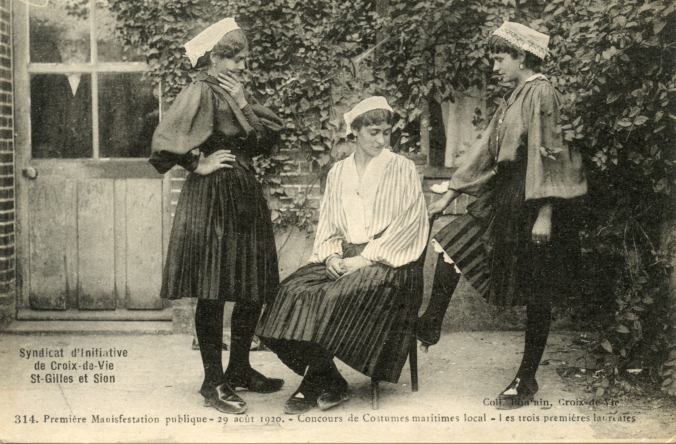 Carte postale, lauréates du concours de costumes organisé par le syndicat d'initiative de Croix-de-Vie, St-Gilles et Sion, 29 août 1920. Coll. Boutain, Croix-de-Vie. Phototypie.